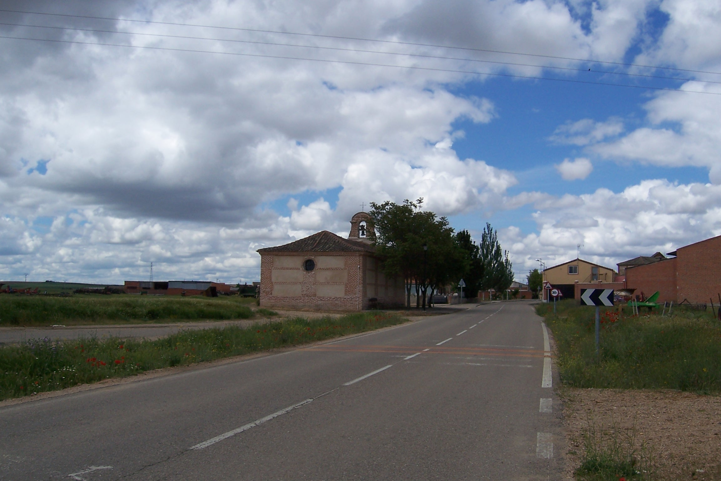 Ventosa de la Cuesta (Valladolid, España). Al fondo a la izquierda se ve el humilladero.